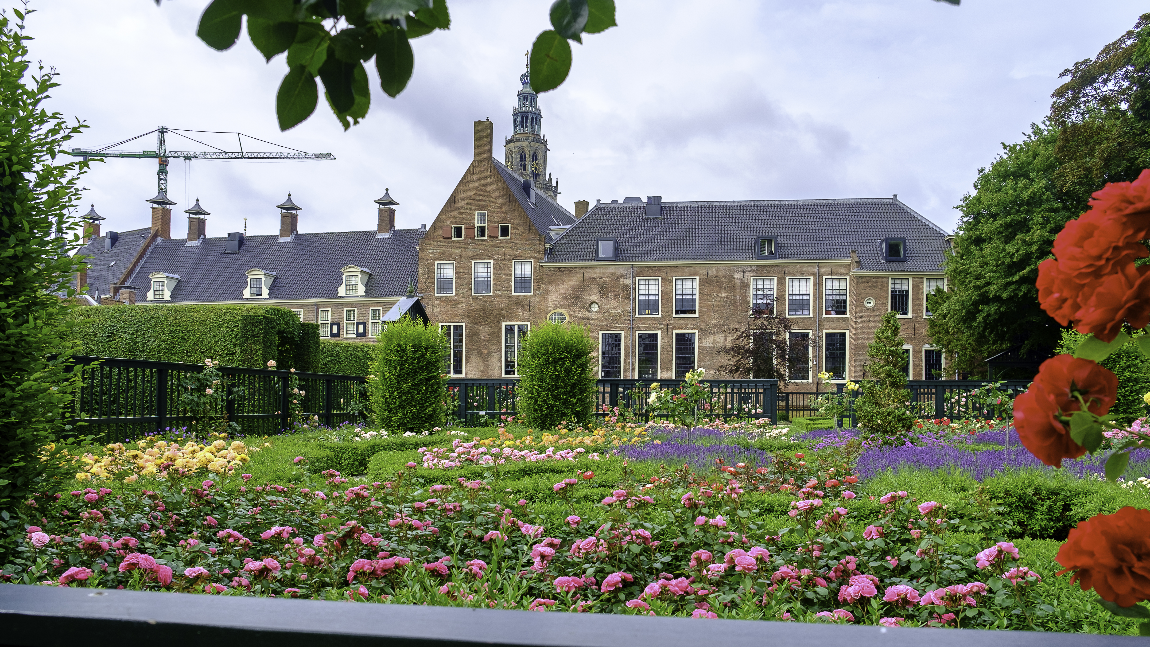 Prinsentuin in Groningen